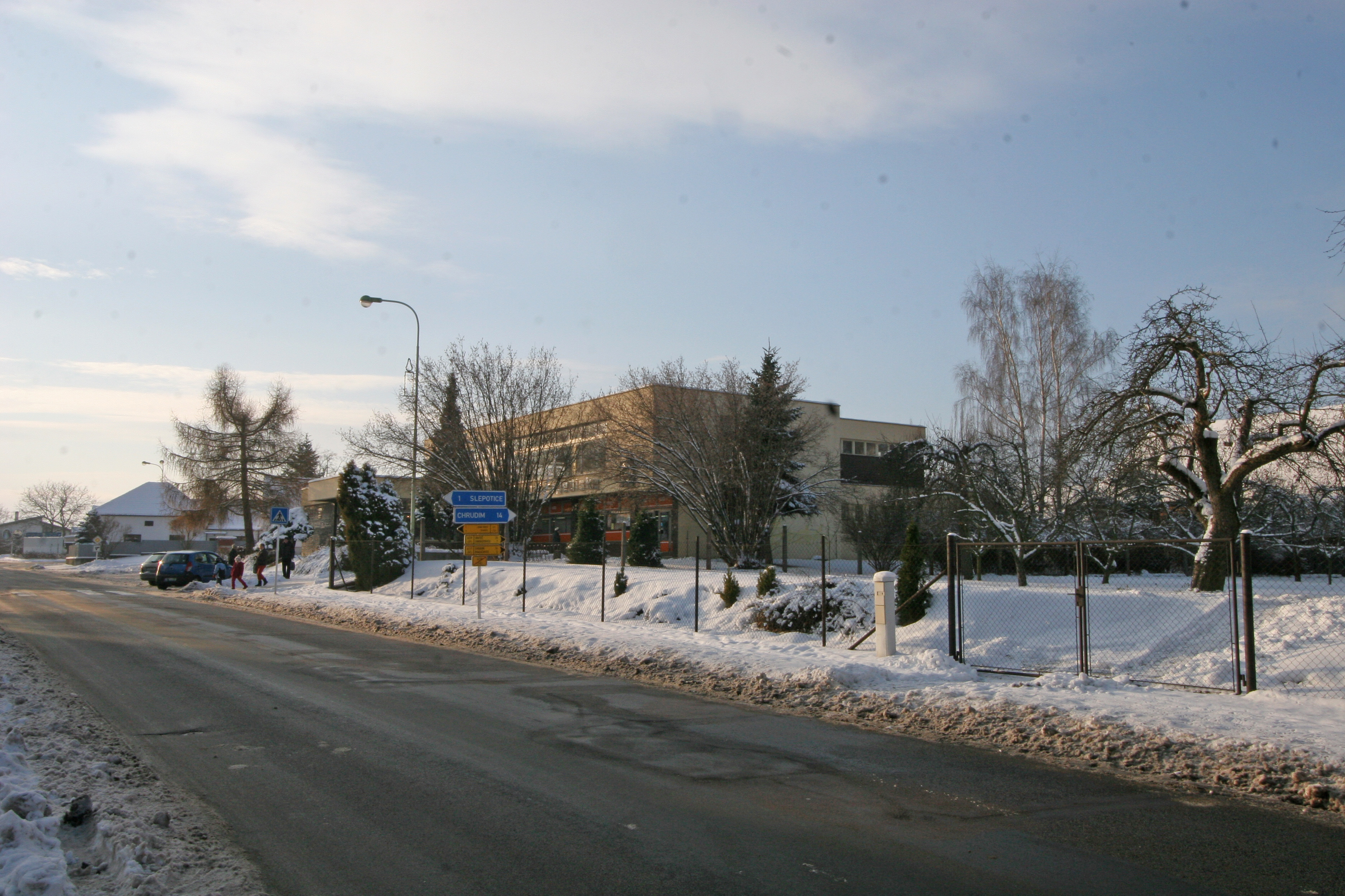 Moravany nákupní středisko